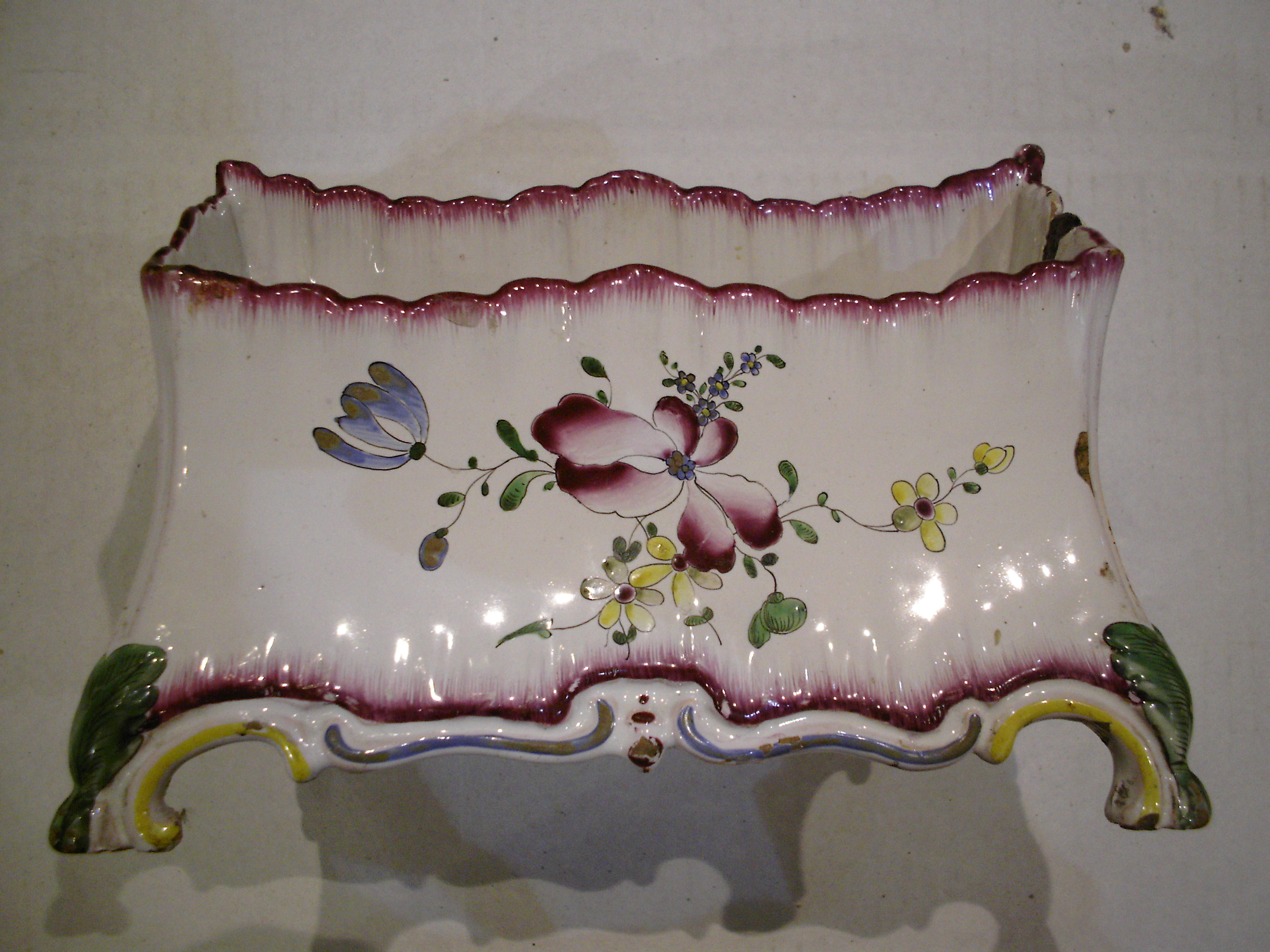 caisse à oignons de joseph Hannong qualité contournée collection privée, Musée du pain d'épice de Gertwiller